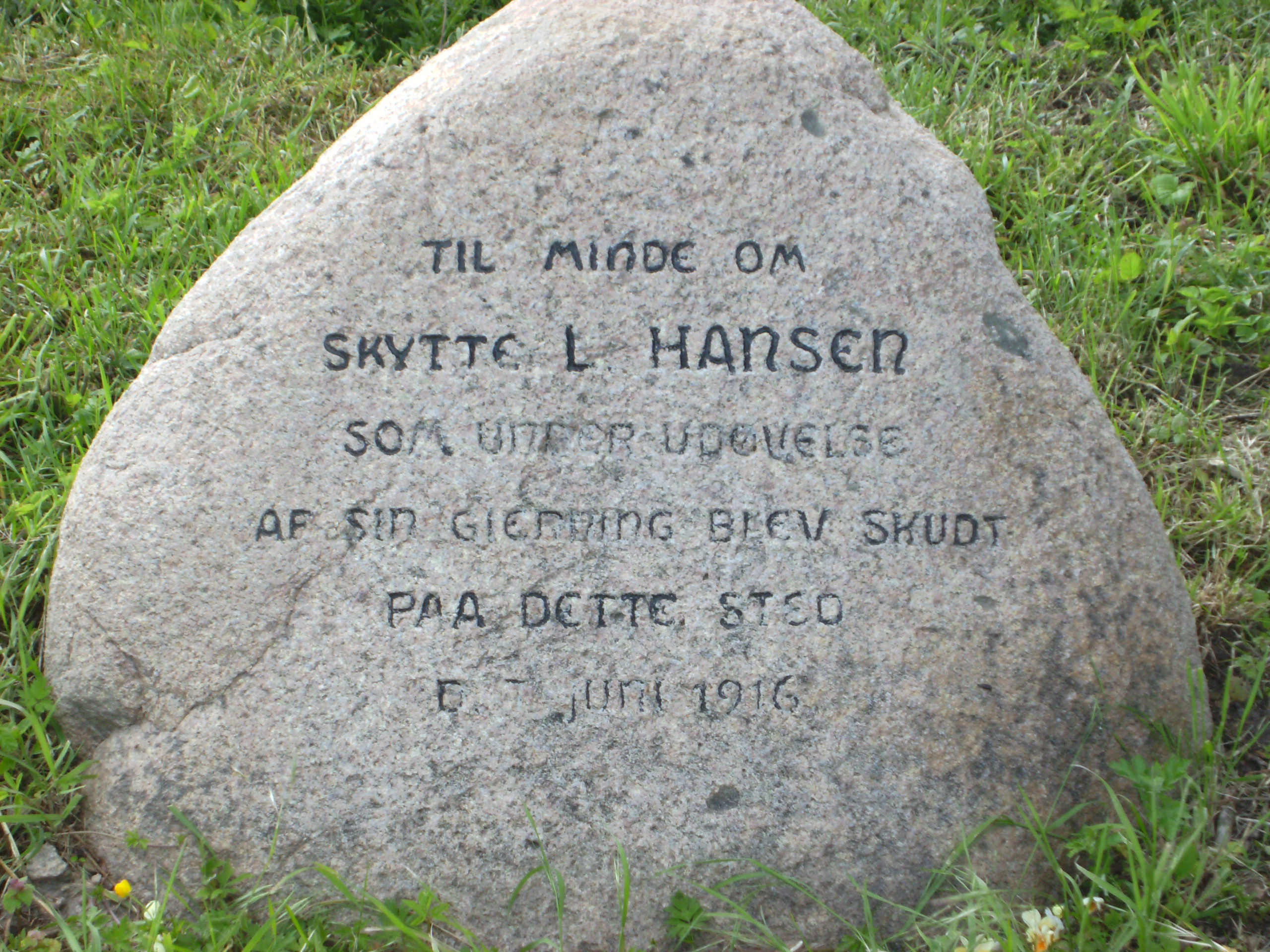 Mindesten over skytte L. Hansen, der blev myrdet nær Godsted i 1916 Memorial stone for a murdered man (Godsted, Denmark)